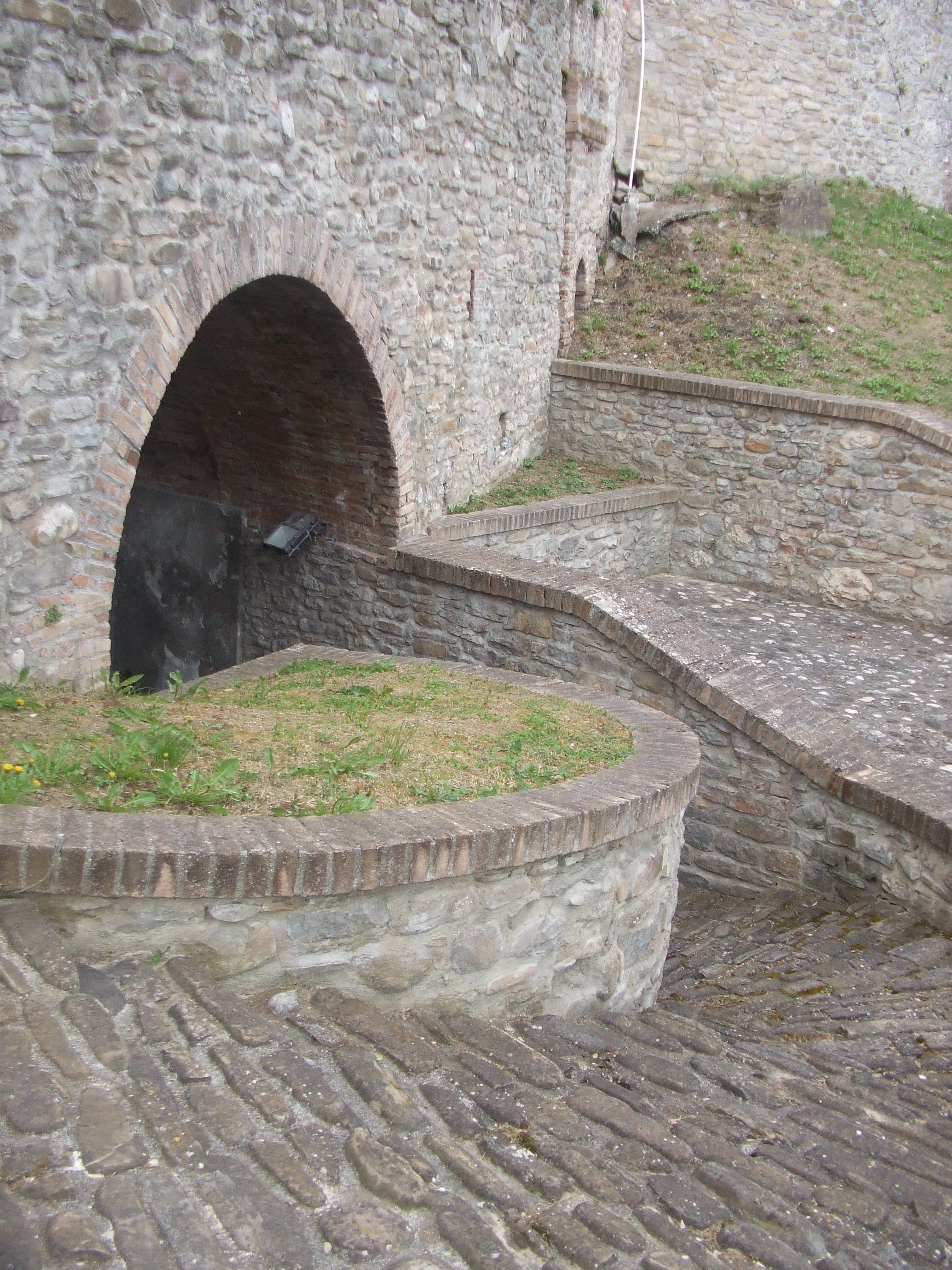 Bisenti fonte vecchia